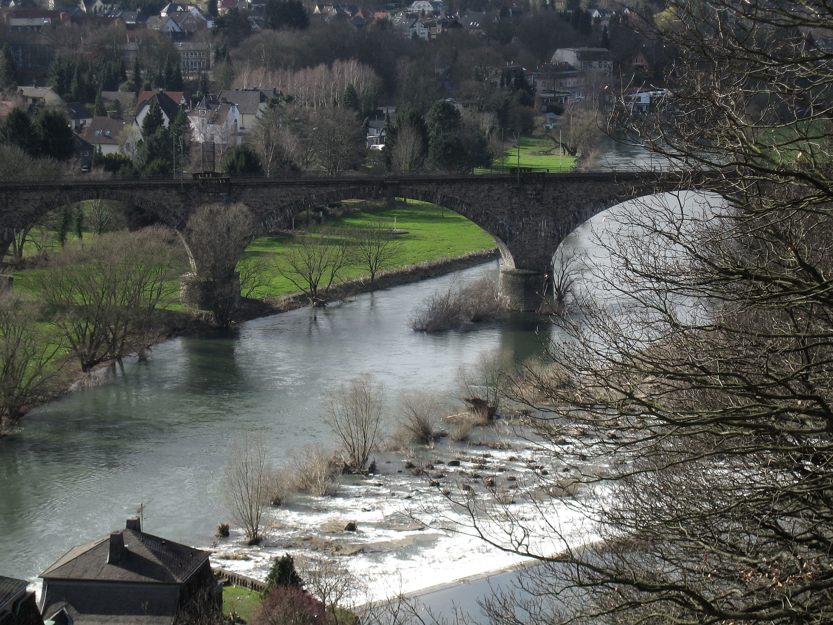 Witten, Hohenstein, Ruhr, Kraftwerk Hohenstein, Viadukt